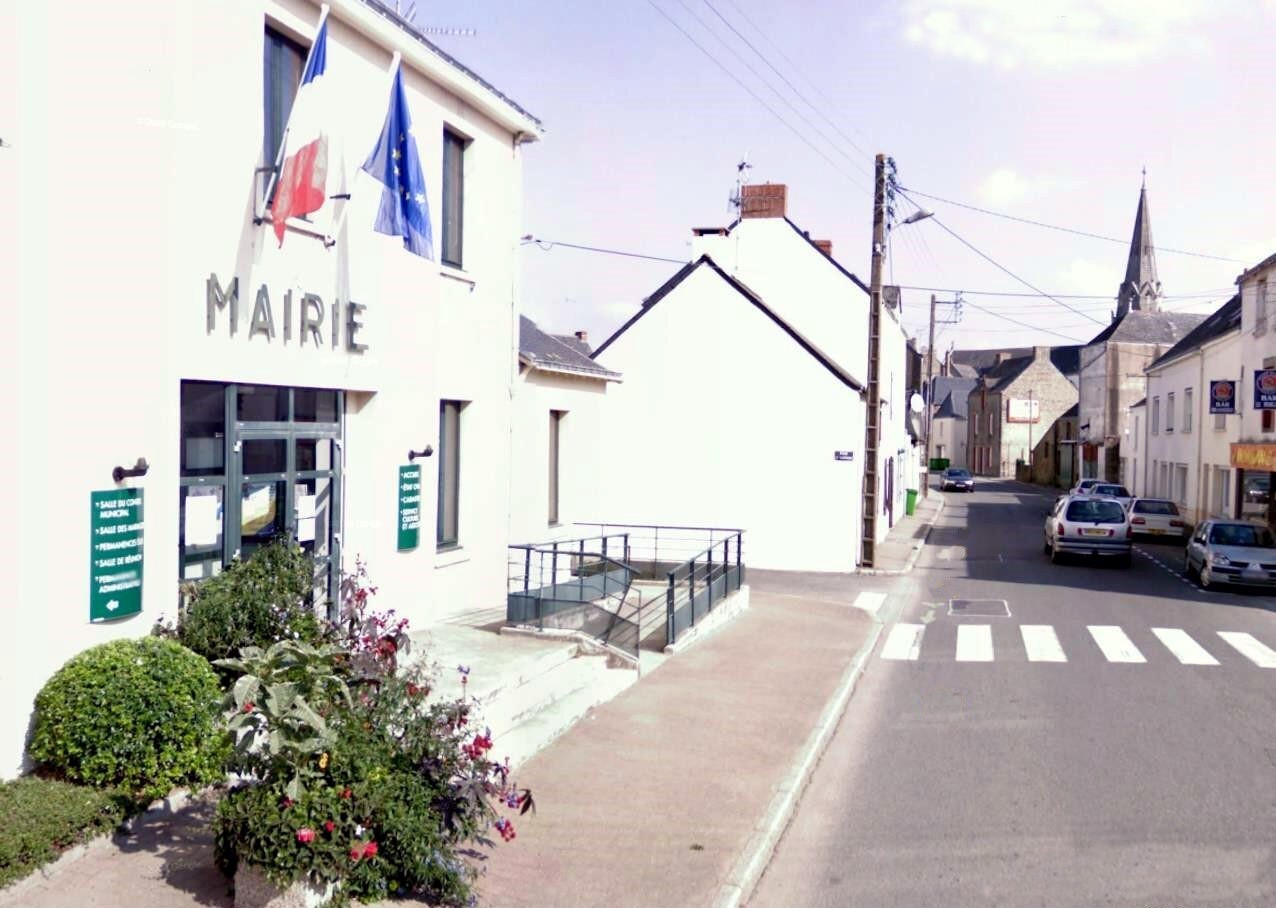 Mairie de La Chapelle des marais